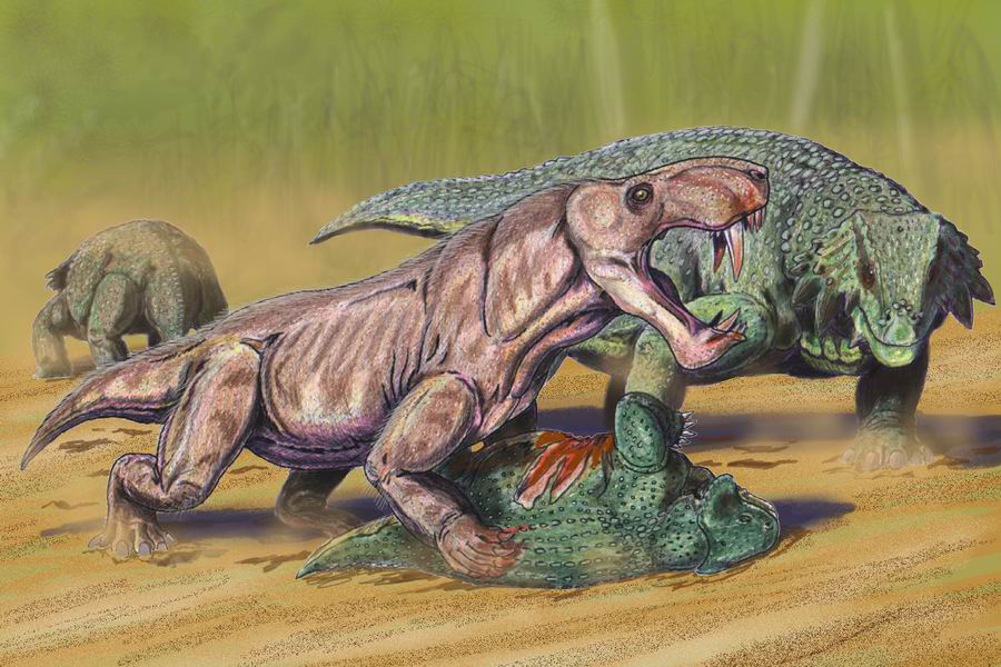 Inostrancevia hunting juvenile Scutosaurus, autor - Bogdanov,2006